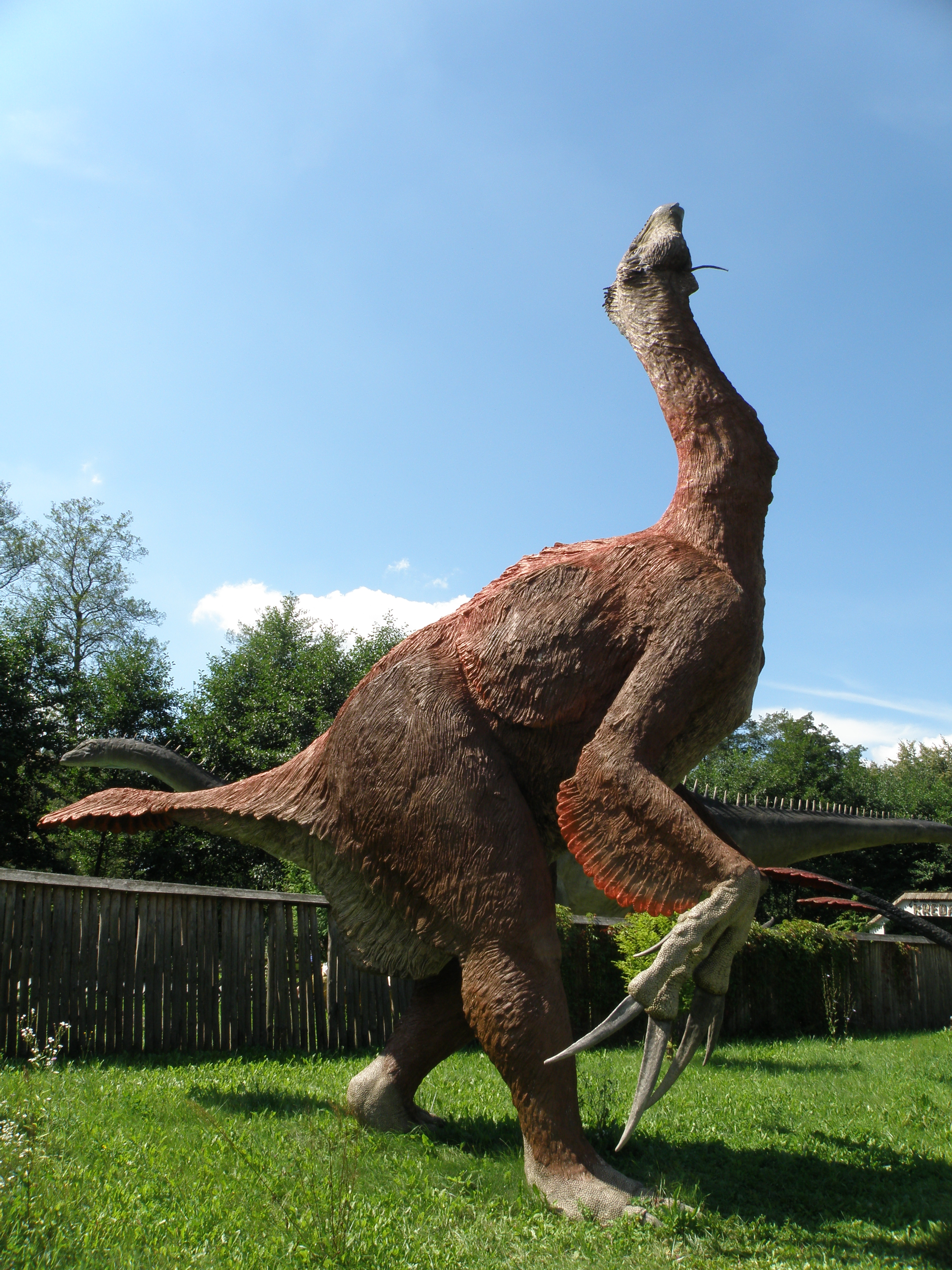 JuraPark Bałtów - Park Dinozaurów - Terizinozaur (Therizinosaurus)